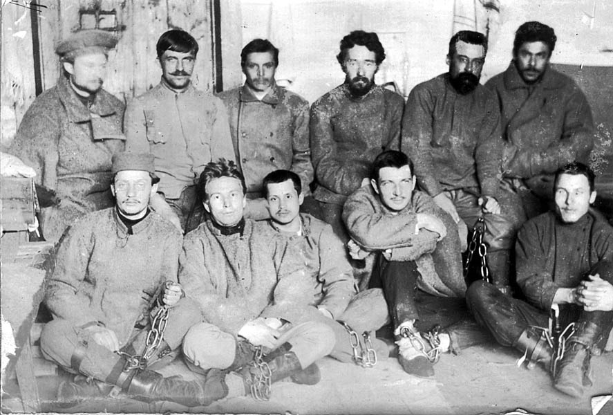 Egor Sozonov ad Akatuj dopo la modifica del regime carcerario con l'equiparazione dei prigionieri politici ai criminali comuni e l'introduzione delle catene